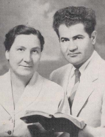 Malagasy: MA Daoud sy Jane Collins